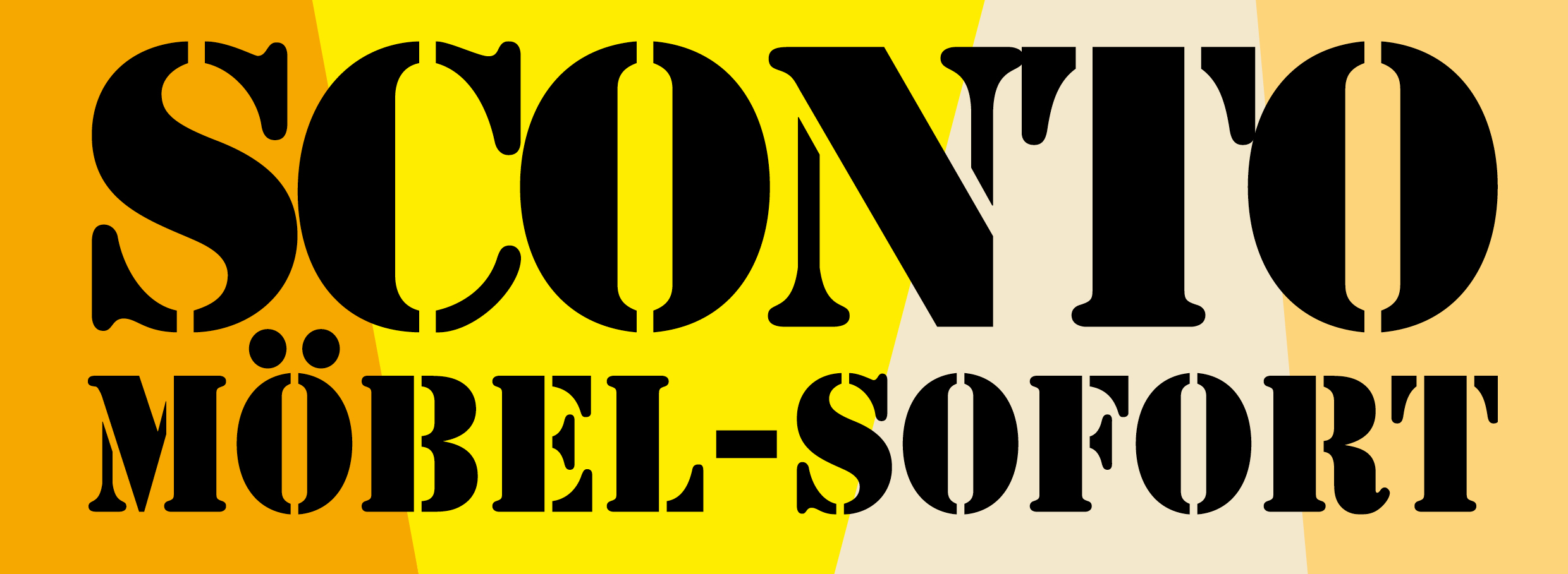 Aktuelles Logo der Firma Sconto